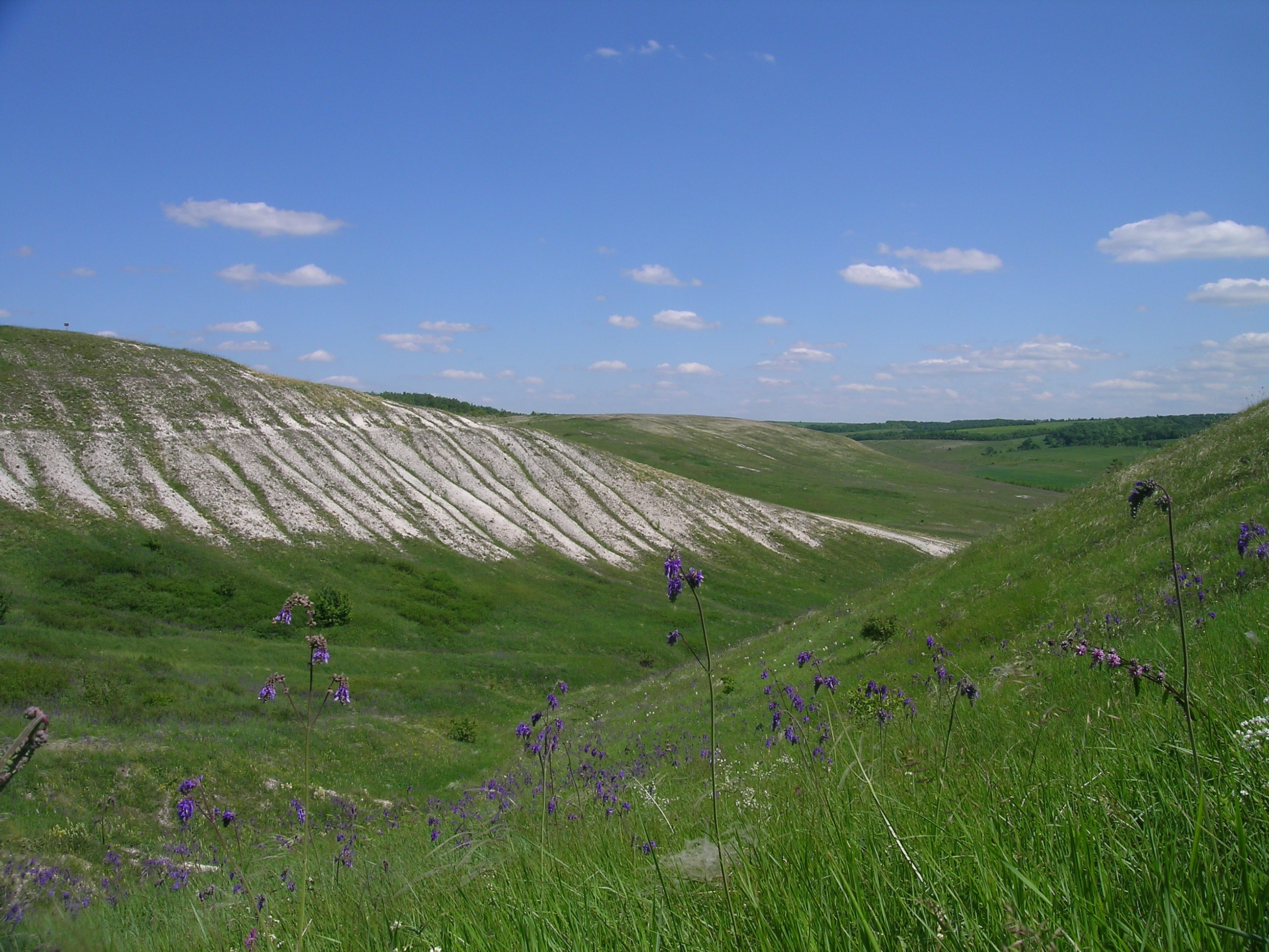 Стенки Изгорья